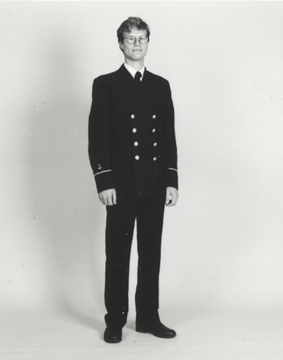 Man iförd uniform m/1948 för sergeant vid Kungl. Flottan, daglig dräkt.